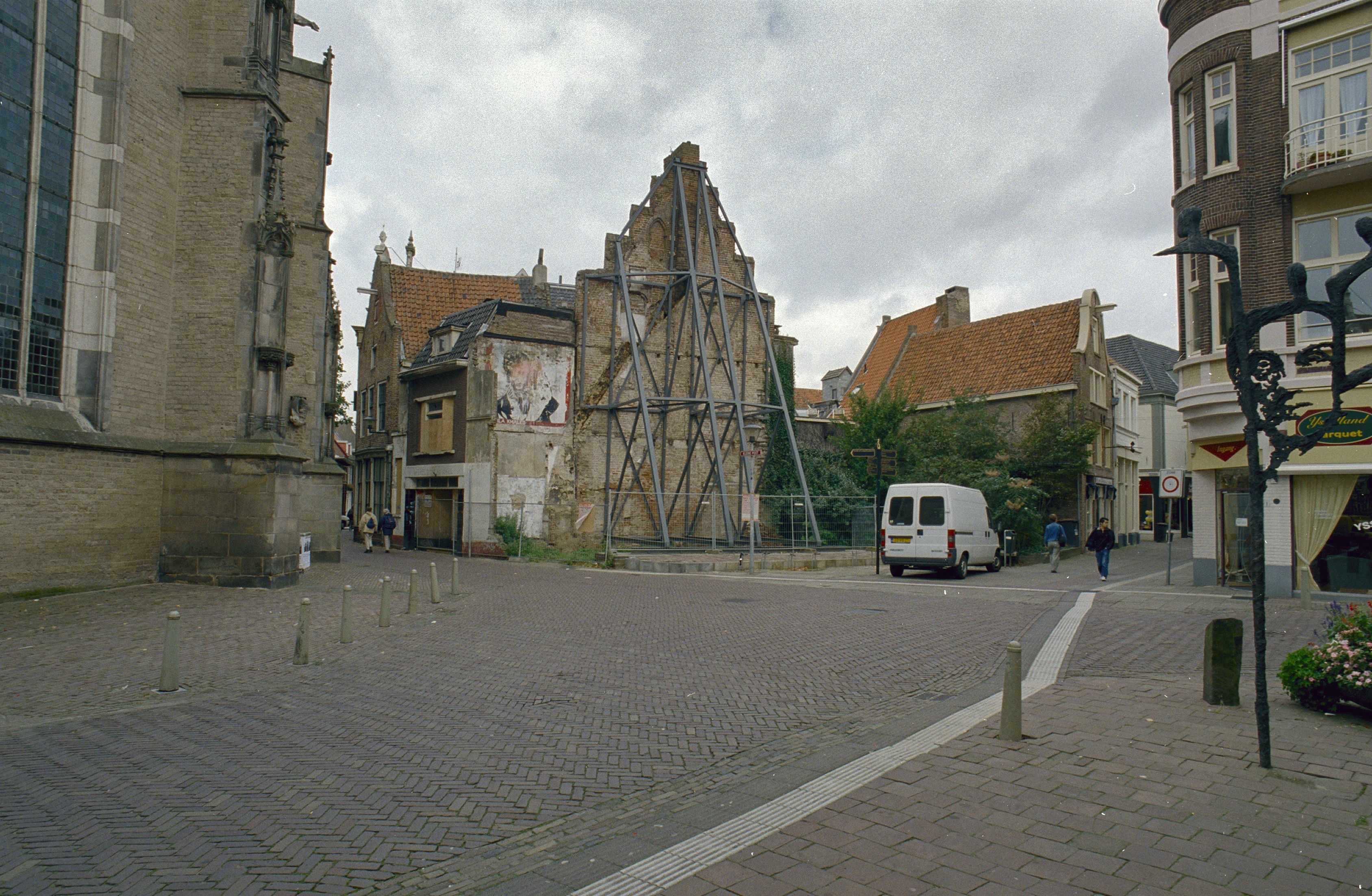 Trapgevel: Situering in de omgeving